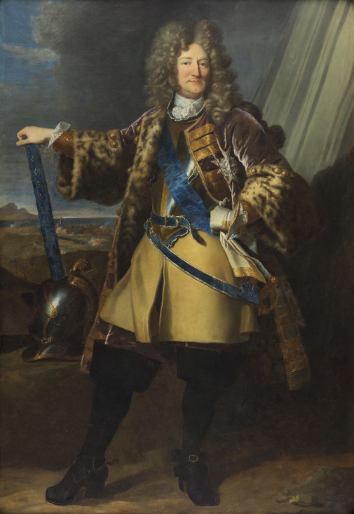 Le duc de Noailles est ici représenté en pied, de trois-quarts, portant le cordon-bleu du Saint-Esprit et le bâton de maréchal. Carrière: servit dans les rangs des gardes du corps du Roi (capitaine en 1661, brigadier en 1665), maréchal de camp (1677). Gouverneur du Languedoc et duc et pair (1678), décoré de l'ordre du Saint-Esprit (1682), gouverneur du Roussillon (1682-1689), commanda l'armée d'Espagne (1689), nommé maréchal de France et chevalier de Saint-Louis (1693).